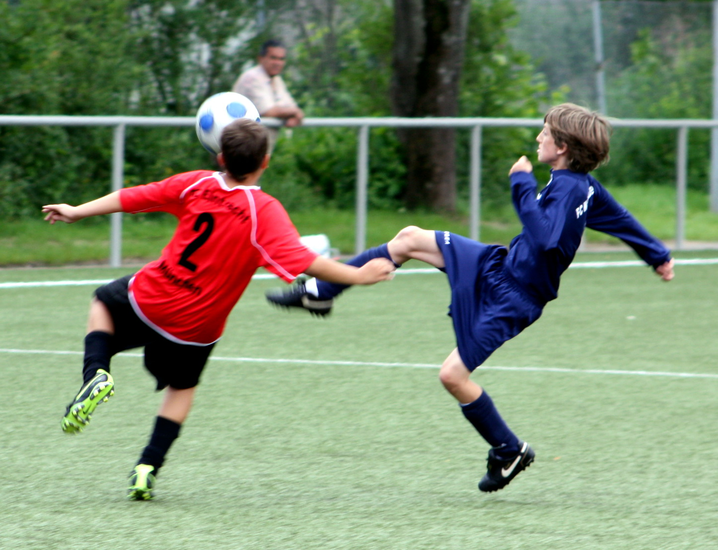 FC Wacker München - Jugendspieler D1 - 2009 - in blau